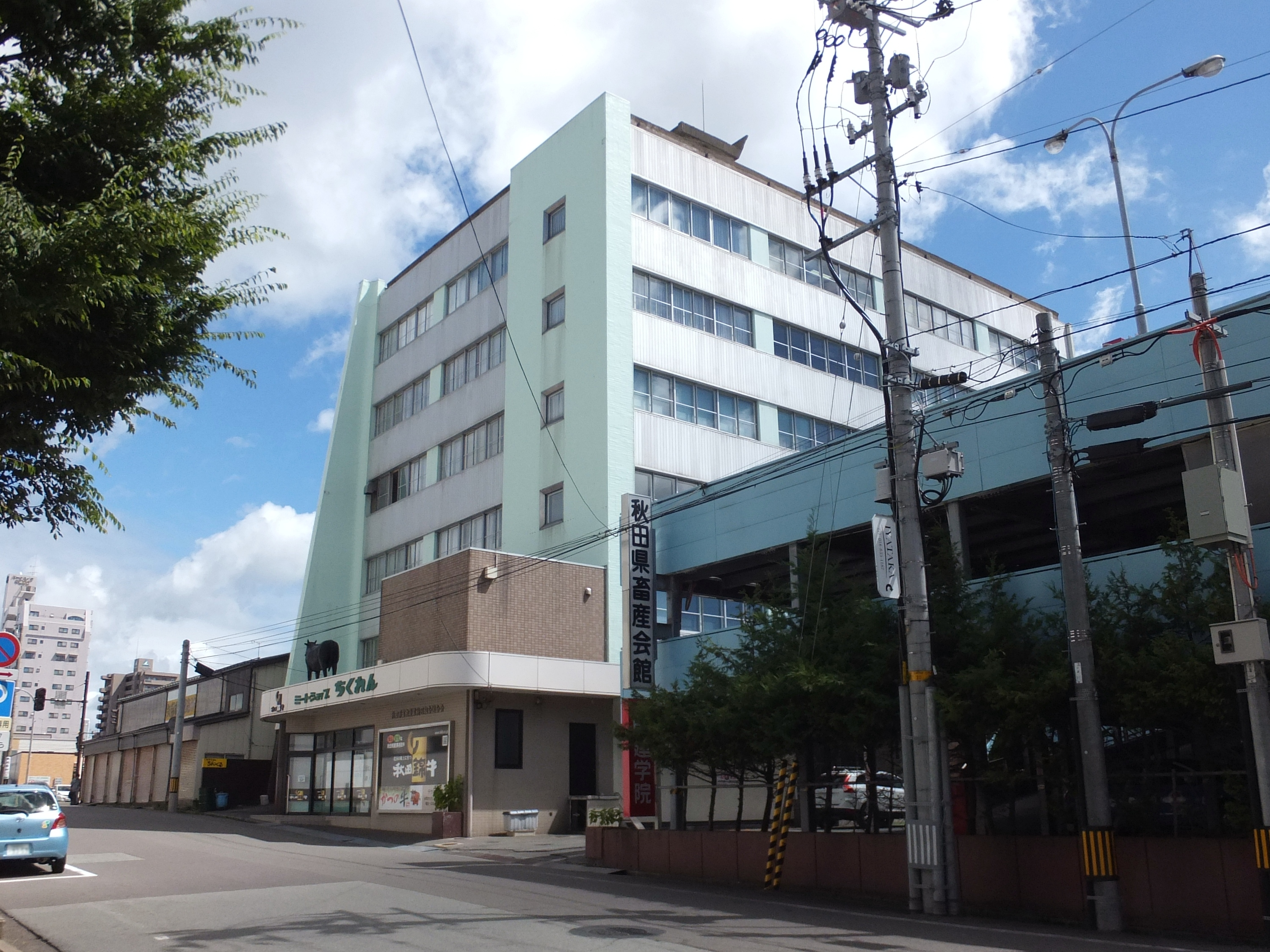 秋田県畜産会館（秋田市中通）